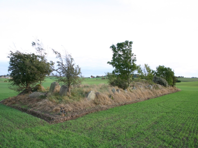 King Humbles Grave, Langeland, Denmark